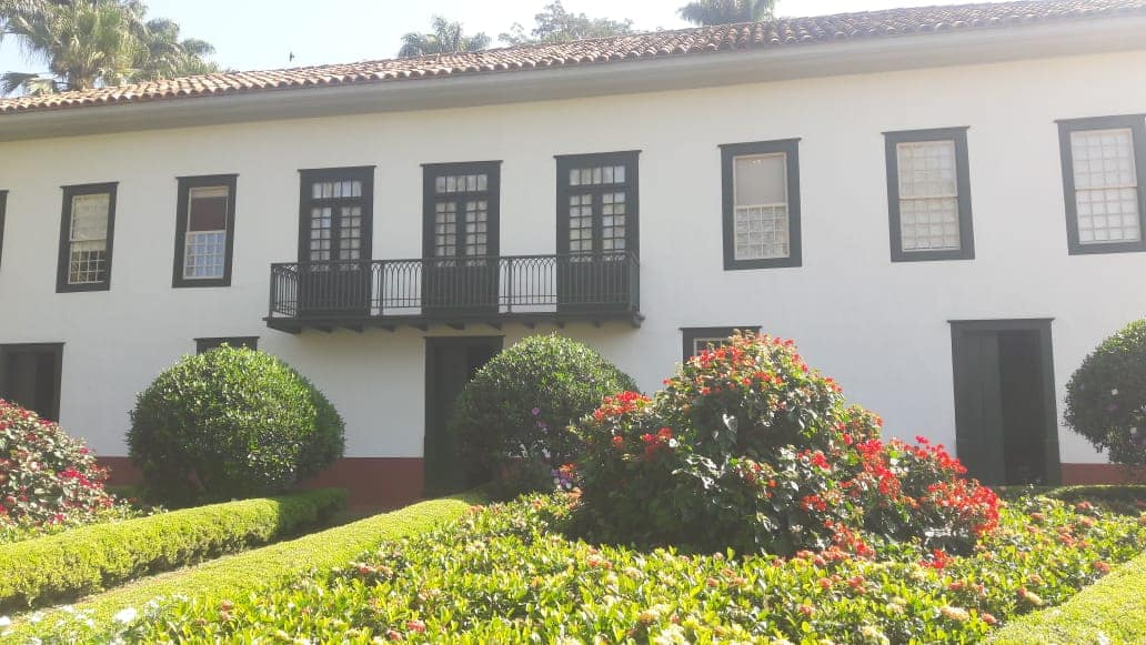 Foto da parte da frente da Casa Grande e parte do jardim